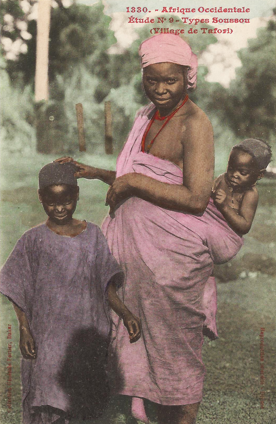 Types Soussou (village de Tafori). [Guinée] Afrique Occidentale